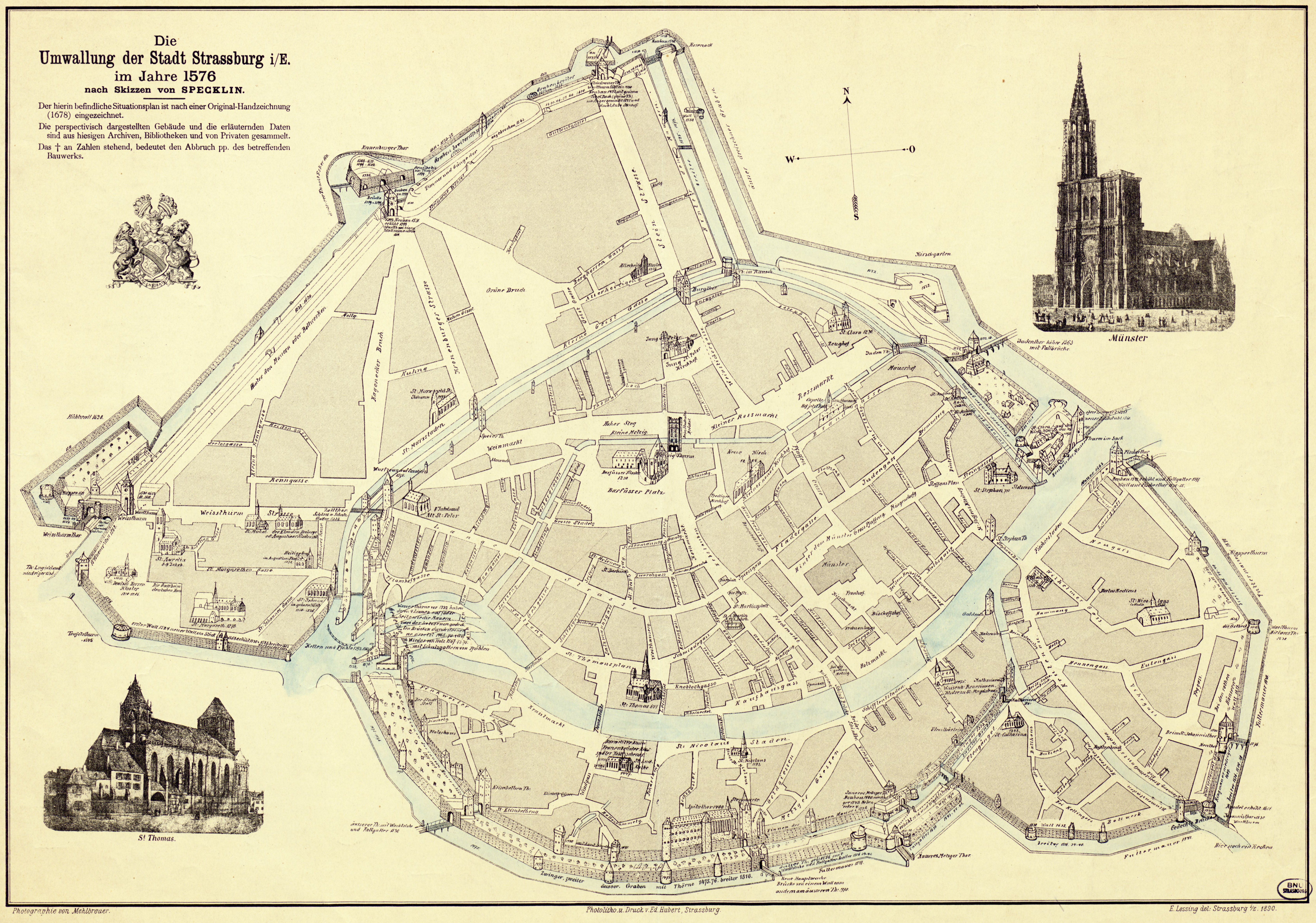 Plan de Strasbourg en 1576